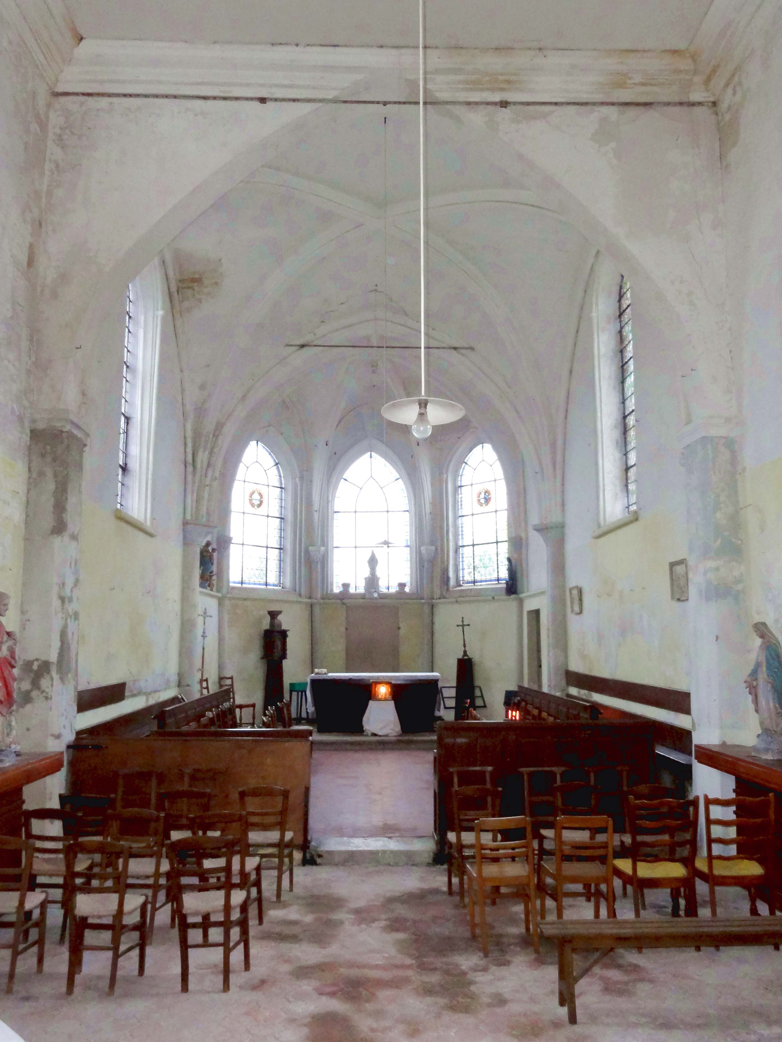 Intérieur de l'église - voir titre.